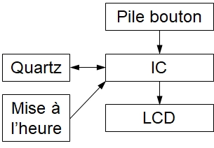 Schéma bloc d'une montre à quartz à affichage analogique.